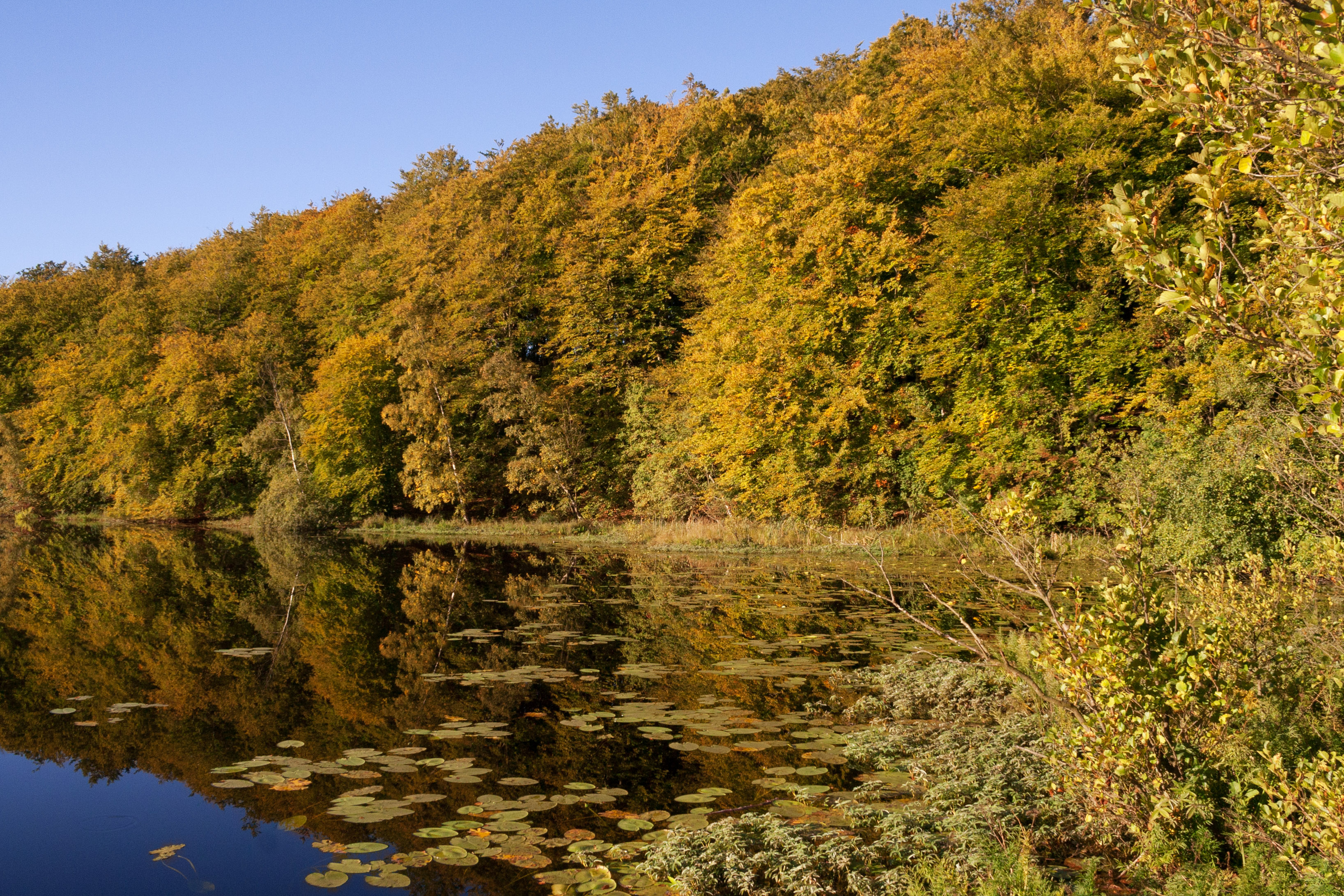 Rügen, Schwarzer See, Naturschutzgebiet, FFH-Gebiet, Landschaftsschutzgebiet, EU-Vogelschutzgebiet Granitz, Biosphärenreservat